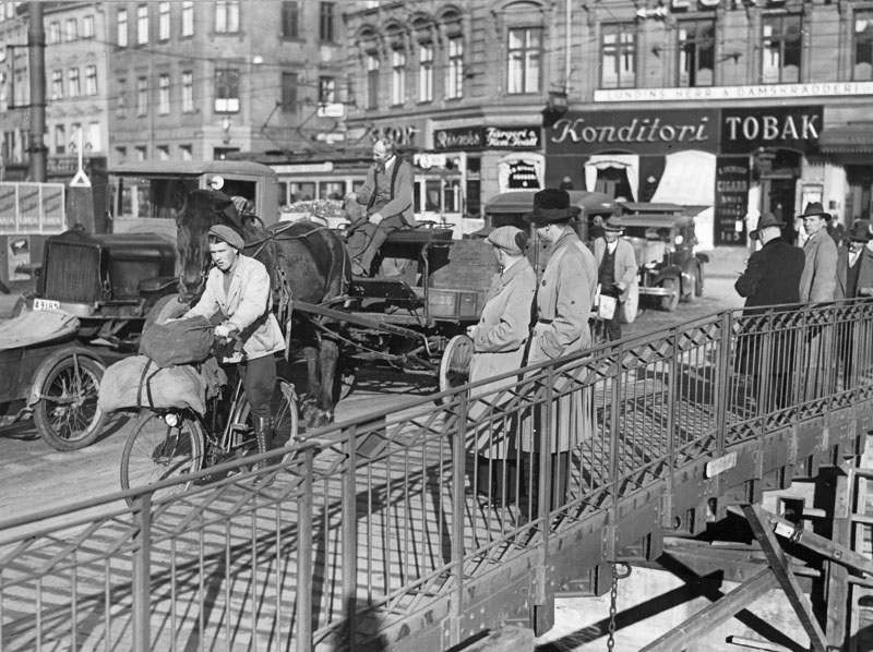 Trafikstockning på Västra slussbron